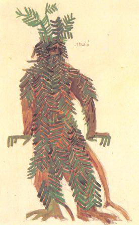 Ф. Ф. Федоровский. Леший. Эскиз костюма к опере Н. А. Римского-Корсакова «Снегурочка». Постановка 1910 года. Оперный театр С. И. Зимина, Москва. Б., акв.)